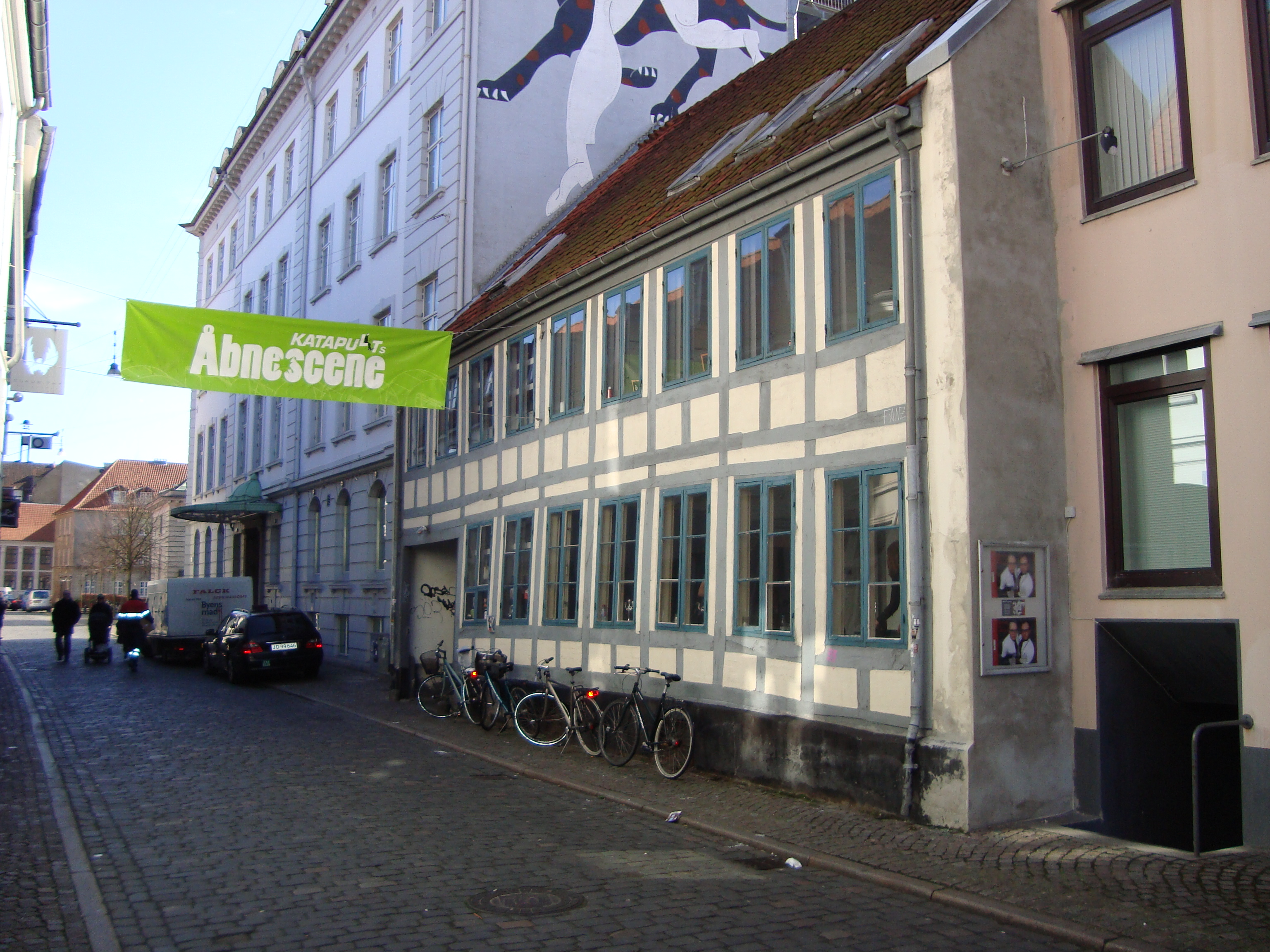 Bygningen Rosensgade 11 i Aarhus, fotograferet da det husede Teater Katapult (tidl. husede bygningen teatret Svalegangen, Byens Åbne Scene og Dramatikerstudio). Huset er oprindeligt bygget som syfilis-hospital i 1790 under navnet "Byens og Distriktets Sygehus".